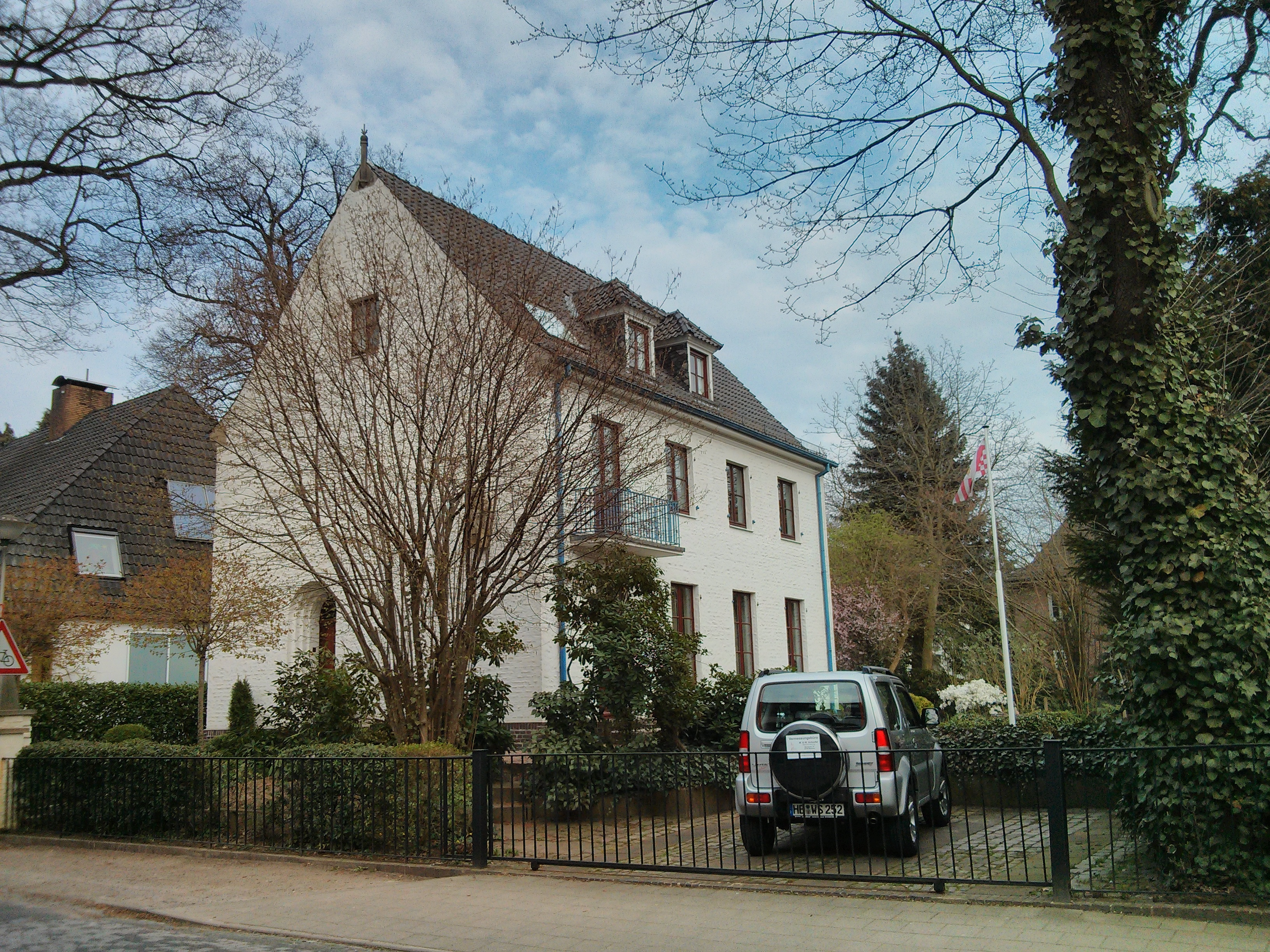 Haus Bothe in Bremen, Riensberger Straße 45 Das abgebildete Objekt ist ein geschütztes Kulturdenkmal in der Freien Hansestadt Bremen, mit der Nr. 1037 beim Landesamt für Denkmalpflege registriert.